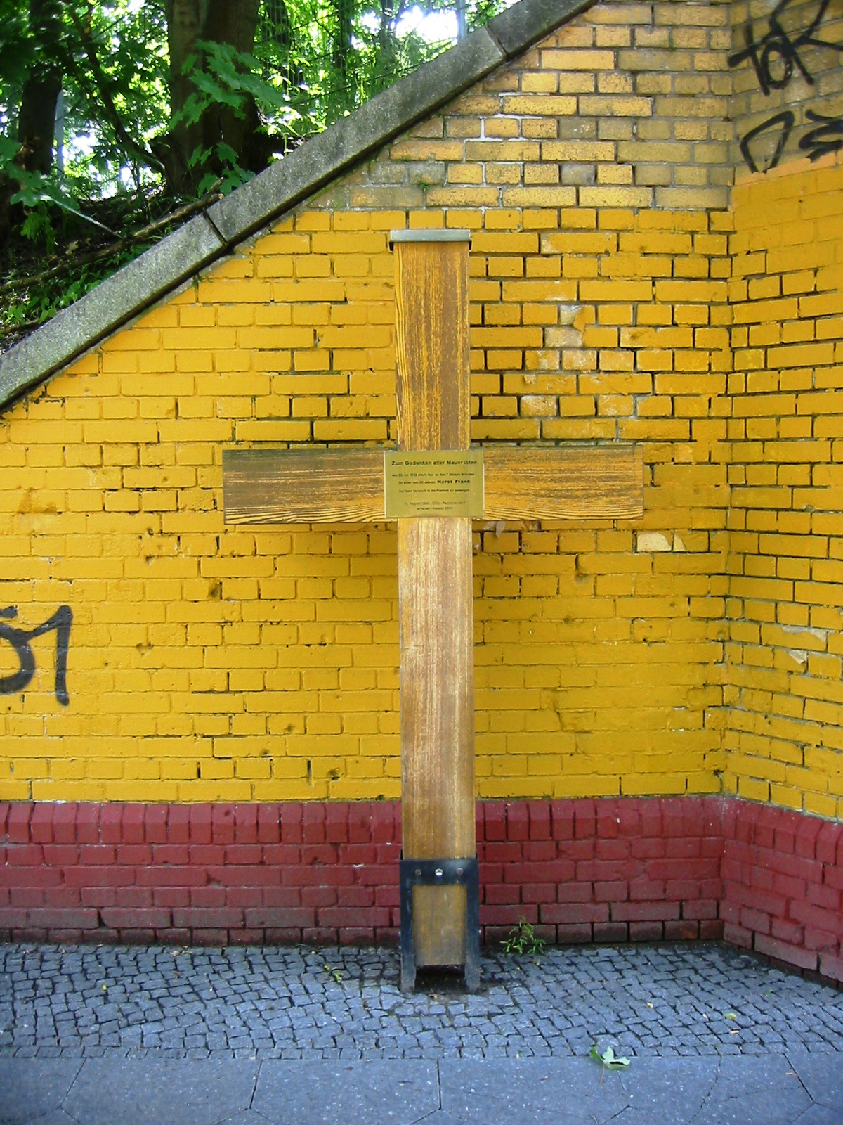 Gedenkkreuz für Horst Frank, ein Todesopfer an der Berliner Mauer. Er wurde während der Flucht im östlichen Berlin-Wilhelmsruh am 29. April 1962 in Berlin erschossen. Das Kreuz befindet sich am westlichen Teil der Klemkestraße in Berlin-Reinickendorf kurz vor der S-Bahn-Brücke nach Oranienburg (S1).